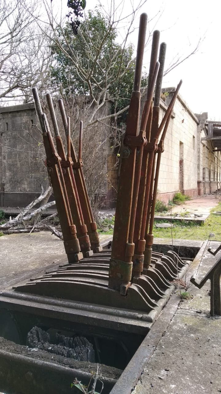 Palancas de cambio de vías